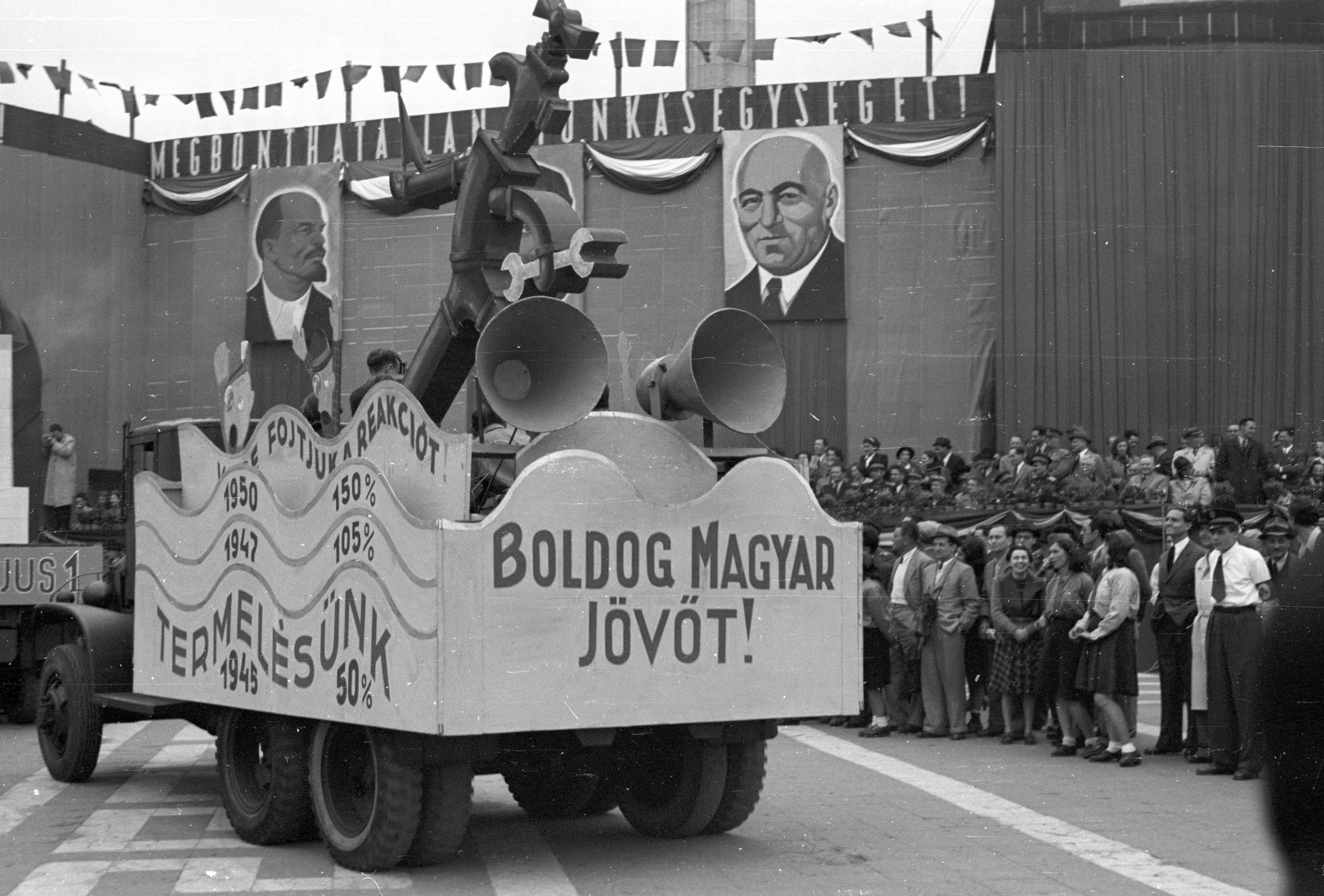 Budapest, Hősök tere, az 1947. május 1-i ünnepség egyik transzparense.